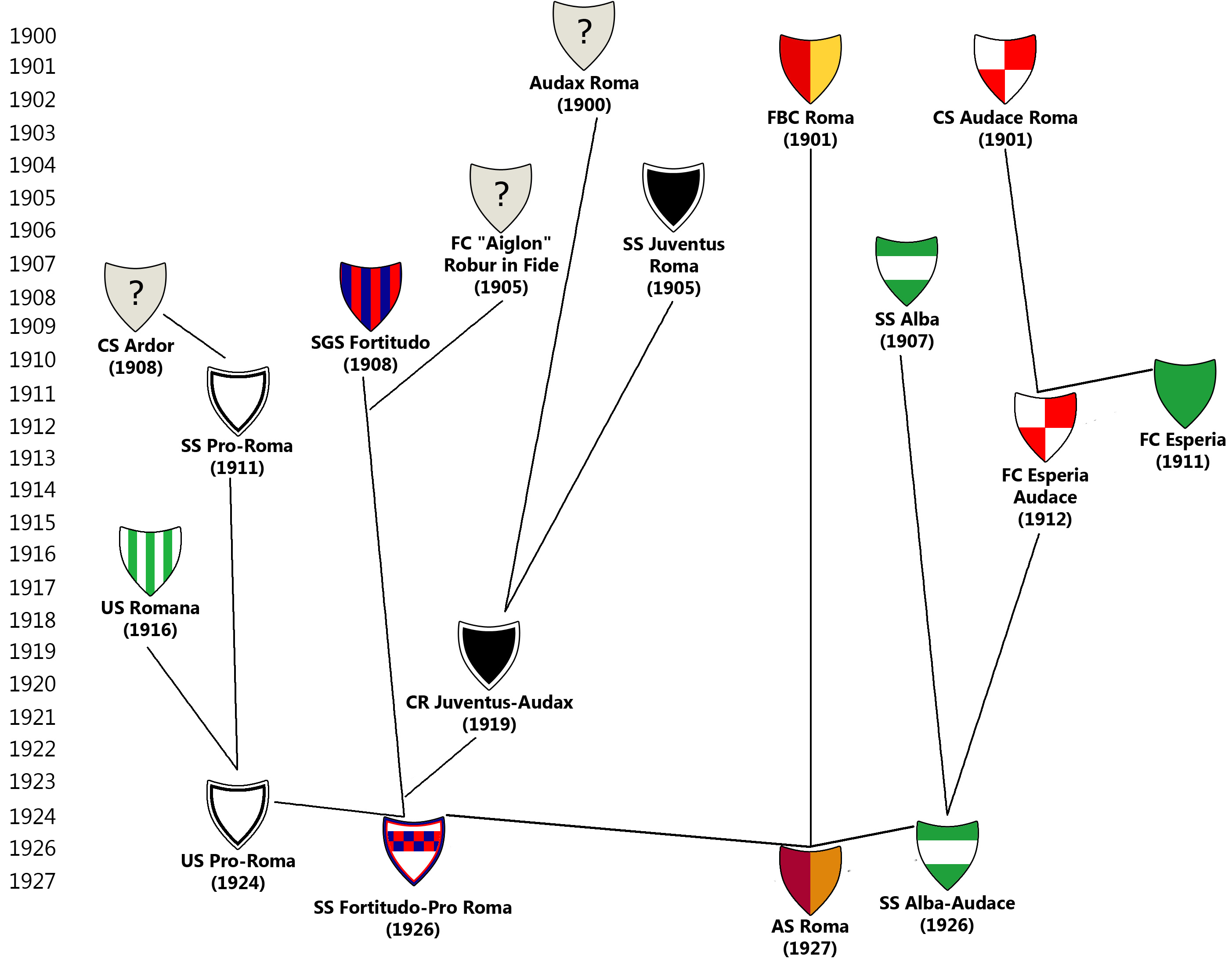 Albero genealogico dell'AS Roma